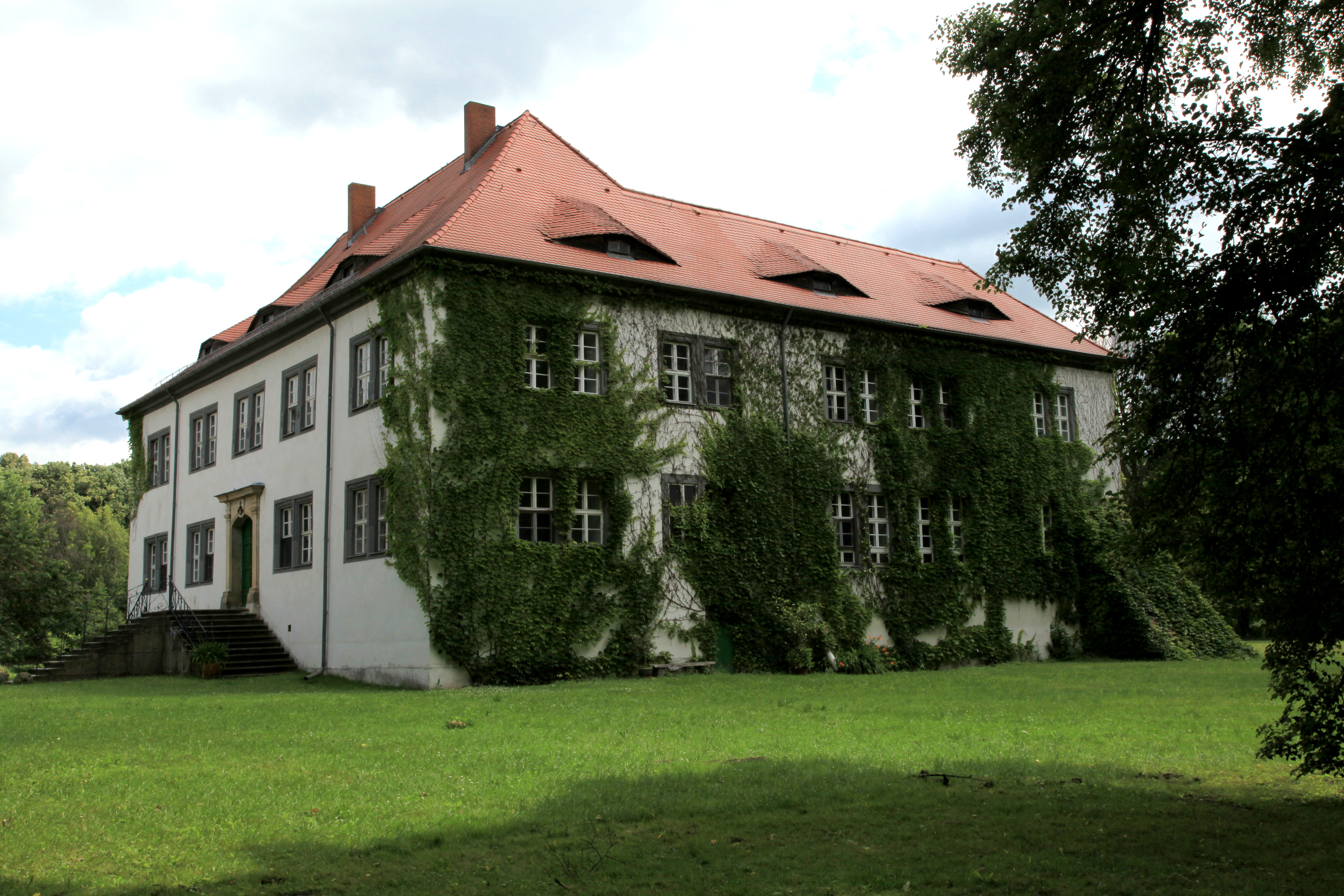 Schloss Spreewiese, Schlossweg 1 in Spreewiese, Großdubrau Hornjoserbsce: Lichański hród